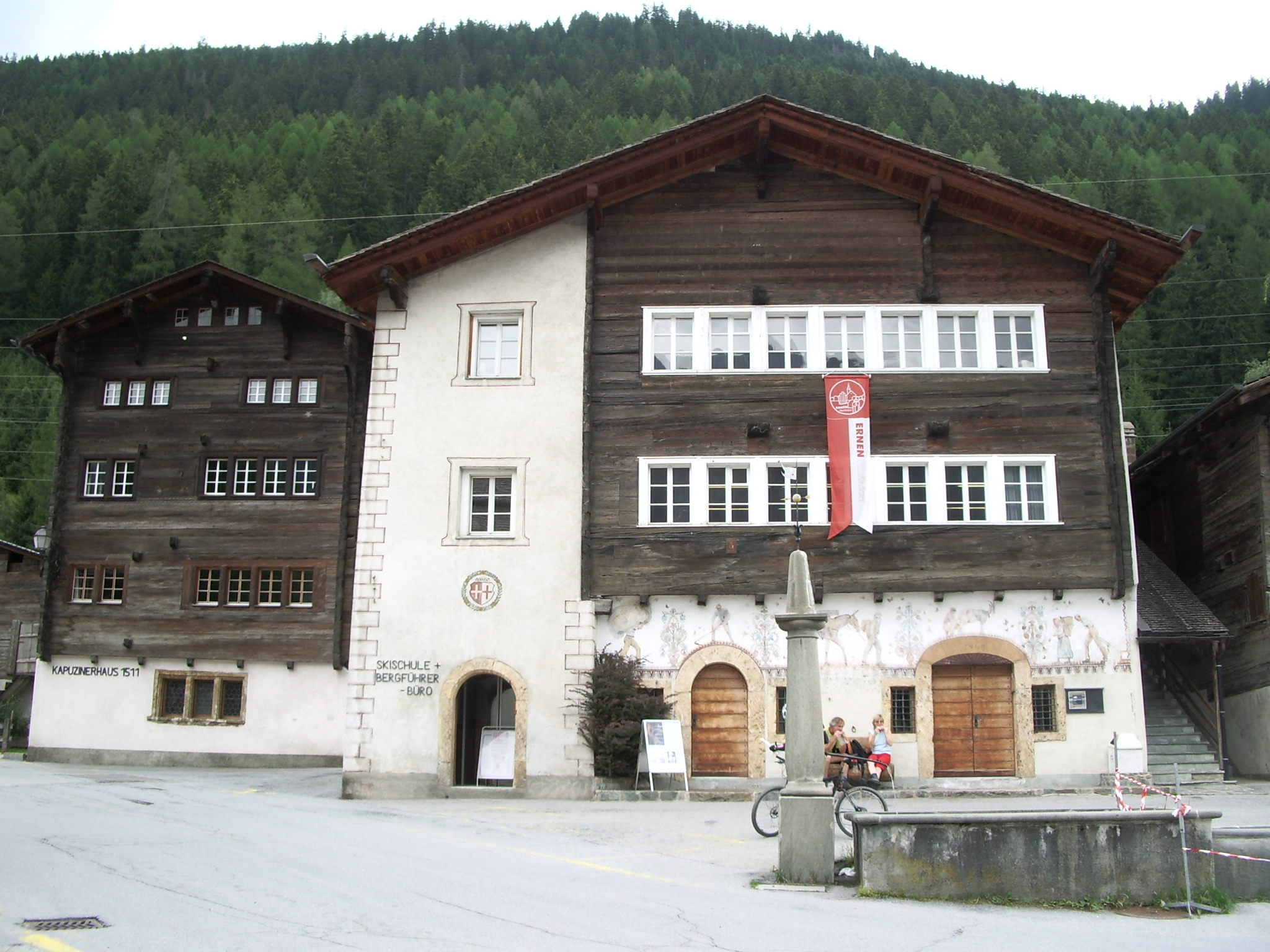 Das Kapuzinerhaus von 1511 (links) und Schulhaus (1538) auf dem Dorfplatz von Ernen. Sommer 2006.